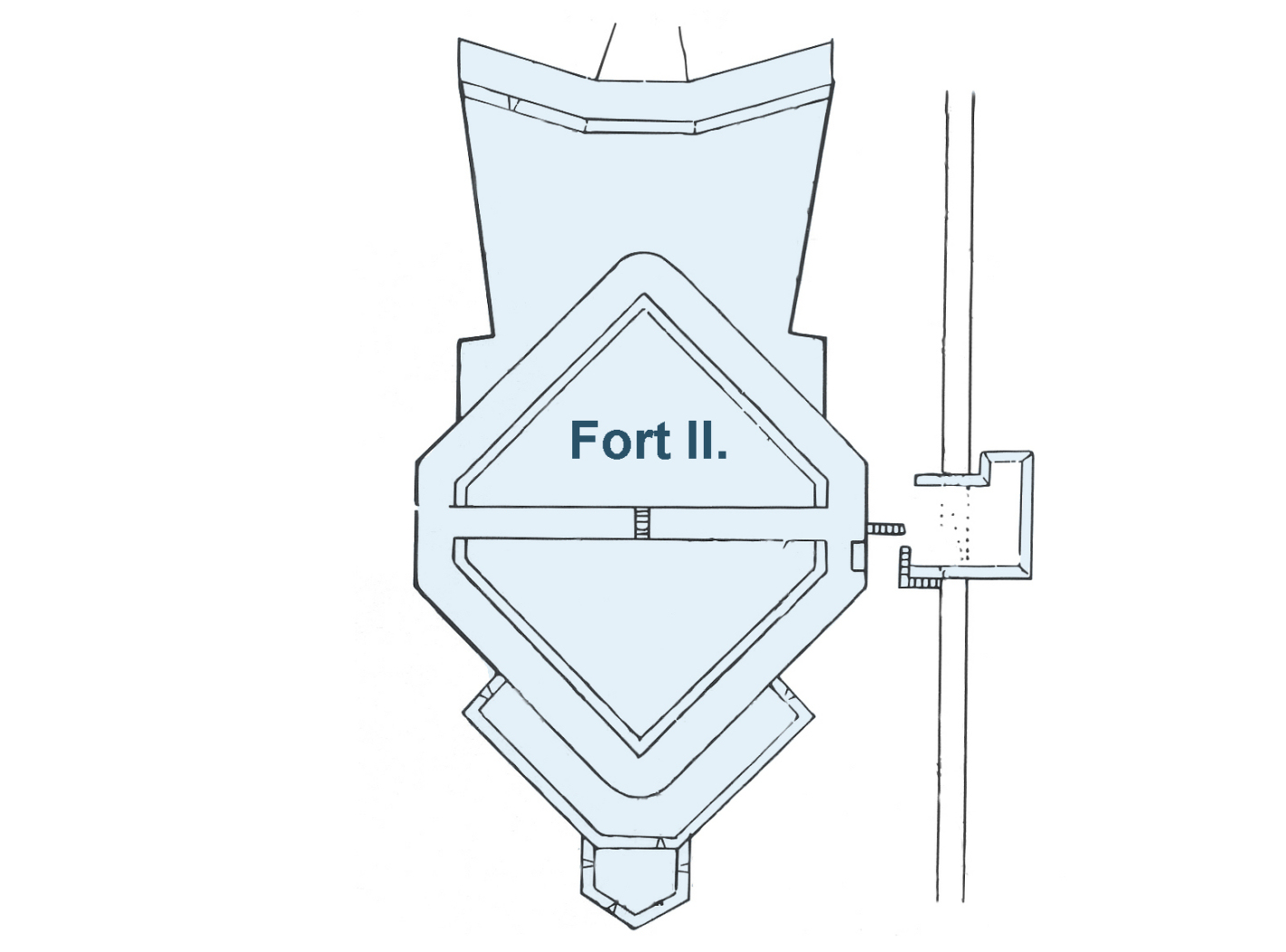 Befestigungsanlagen auf dem Klüt, Fort II.